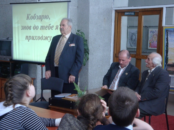 Встреча с читателями областной библиотеки для детей имени Т.Г. Шевченко